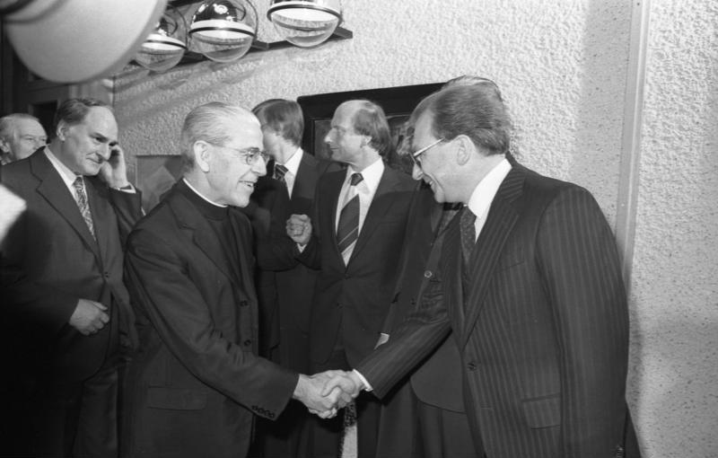 Empfang in der Landesvertretung Baden-Württemberg für Ministerpräsident Lothar Späth